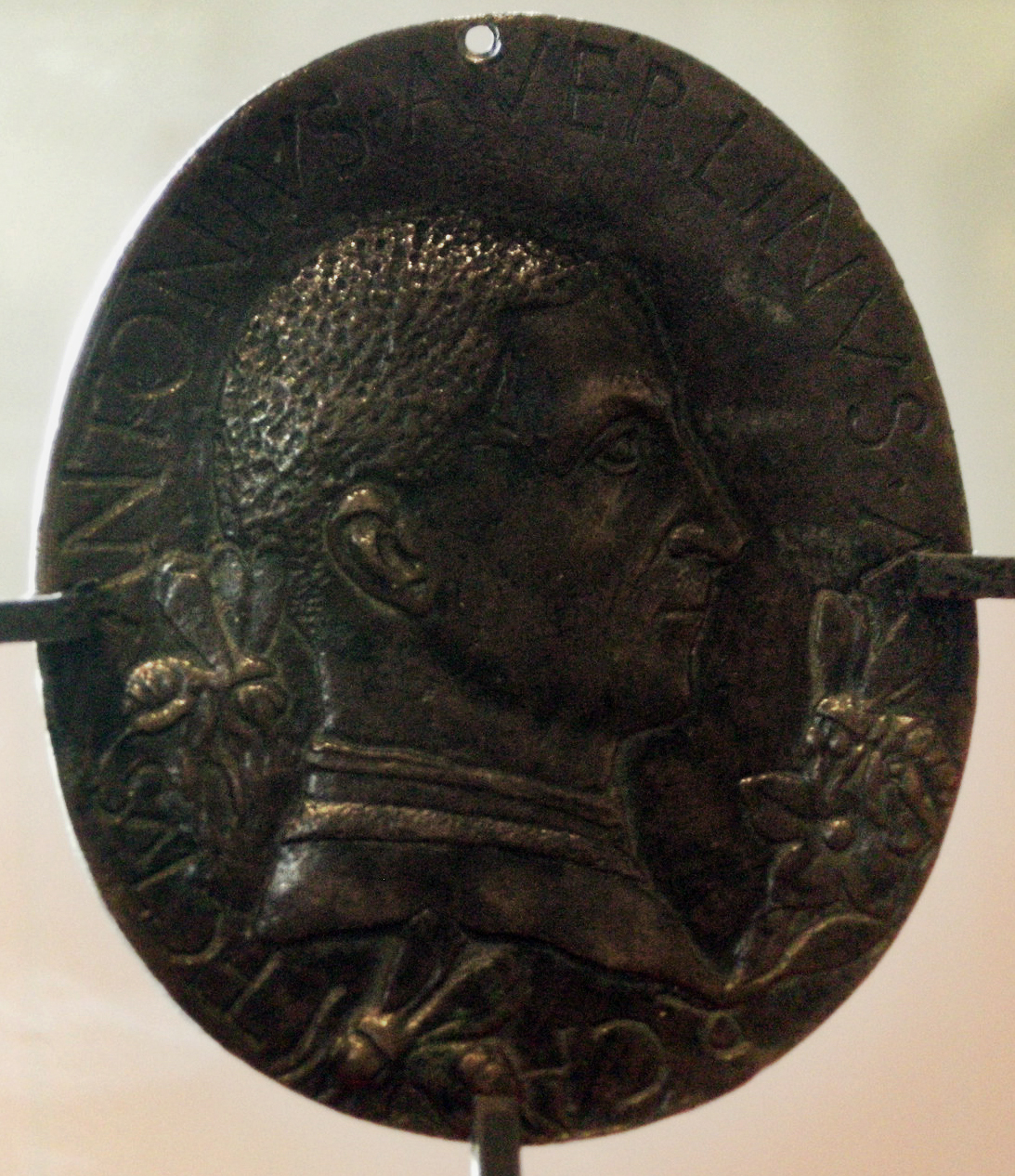 Recto della medaglia con l'autoritratto del Filarete (1460 ca.), conservata nel medagliere della Pinacoteca del Castello Sforzesco di Milano.